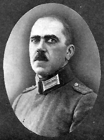 Oberst von Brandenstein, letzter Kommandeur der 15er.